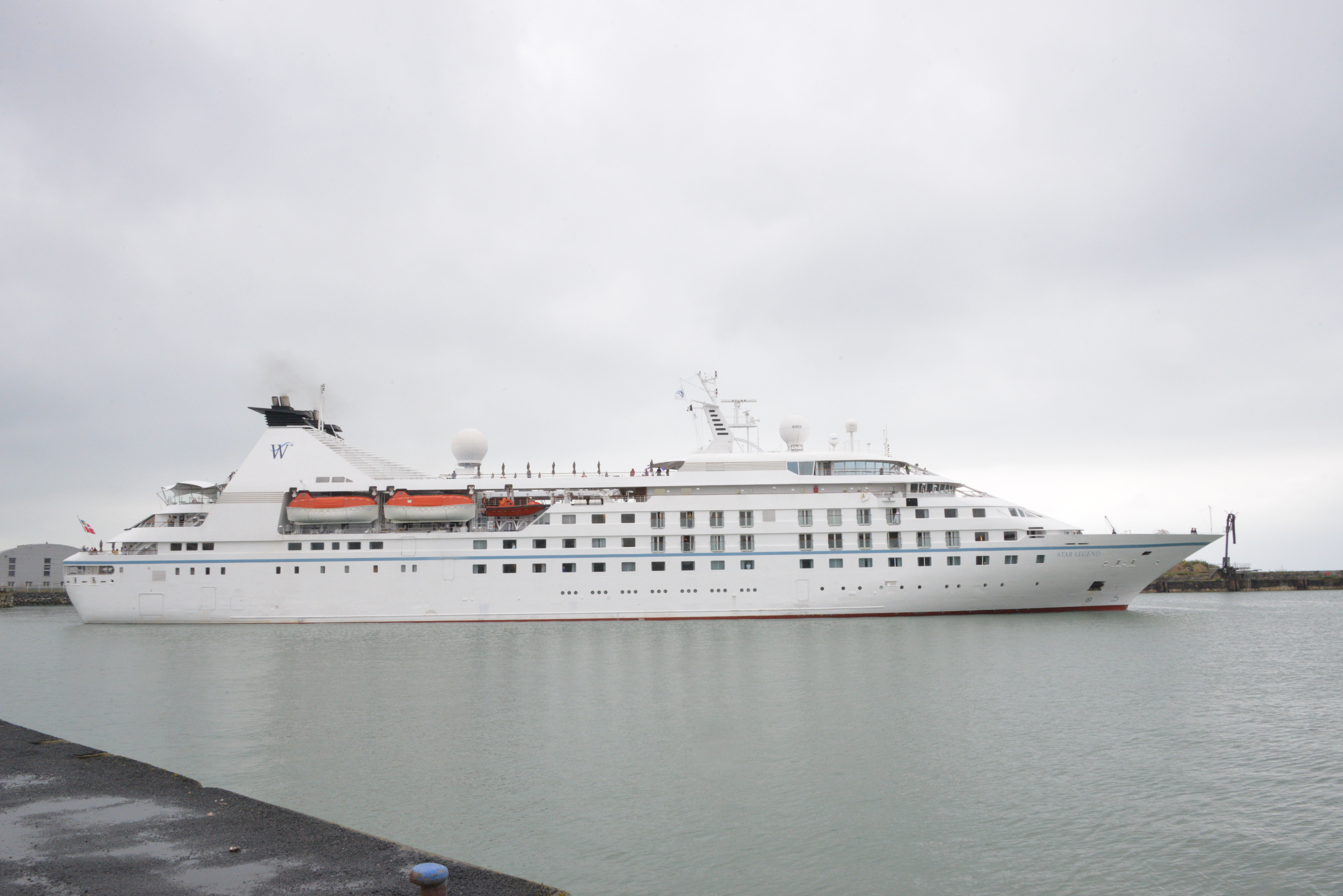 Après y avoir fait escale, le paquebot de croisière MS « Star Legend » repartant du port de commerce de La Pallice par un dimanche au ciel gris et pluvieux. Précédemment appelé « Seabourn Legend », ce navire a était racheté par la Windstar Cruises en 2015 et renommé « Star Legend ». Il a été lancé en 1992. IMO 9008598. Immatriculé aux Bahamas. La Rochelle, Charente-Maritime, France.